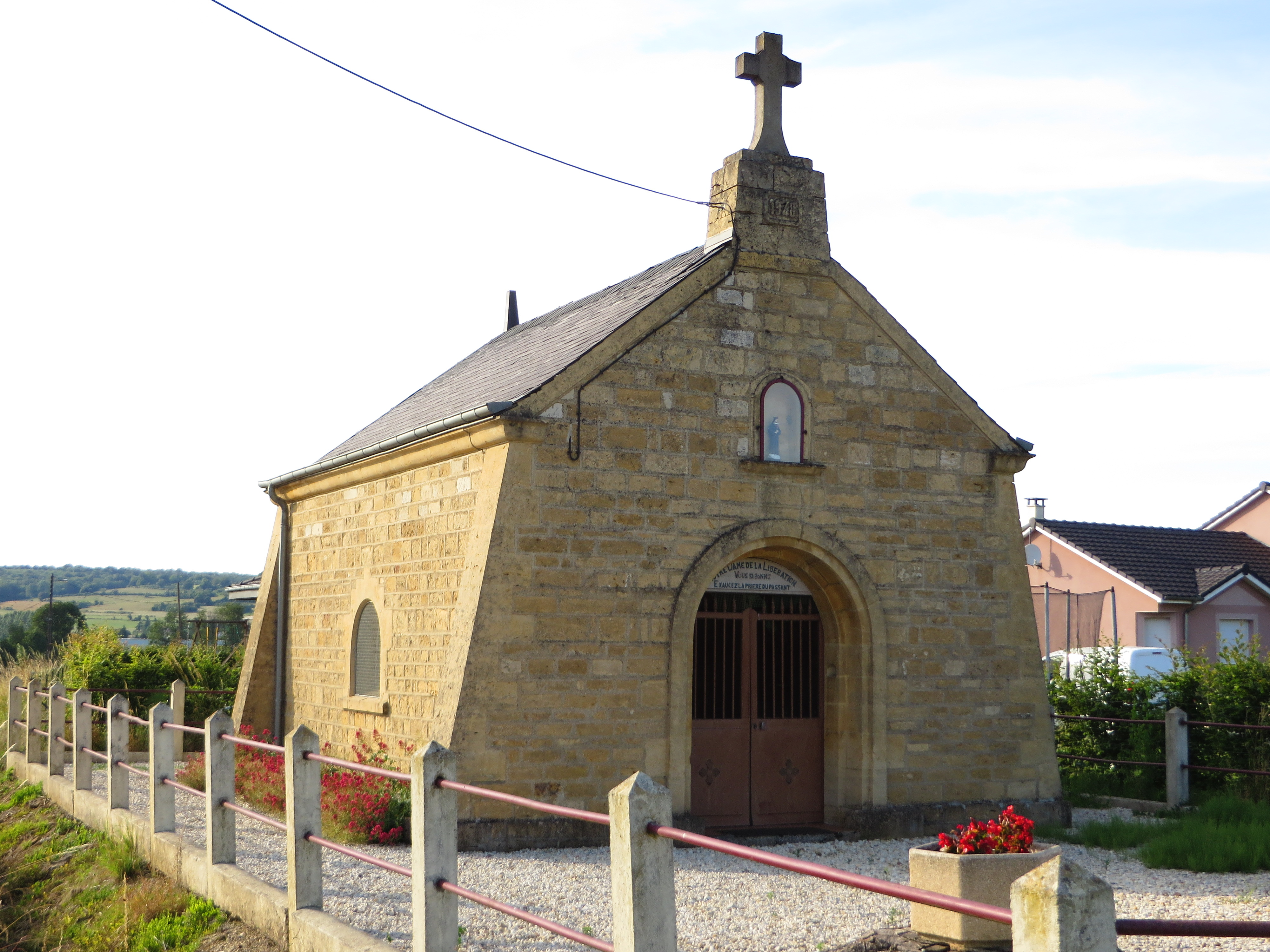 Chauvency-le-Château Chapelle Notre-Dame-de-la-Libération